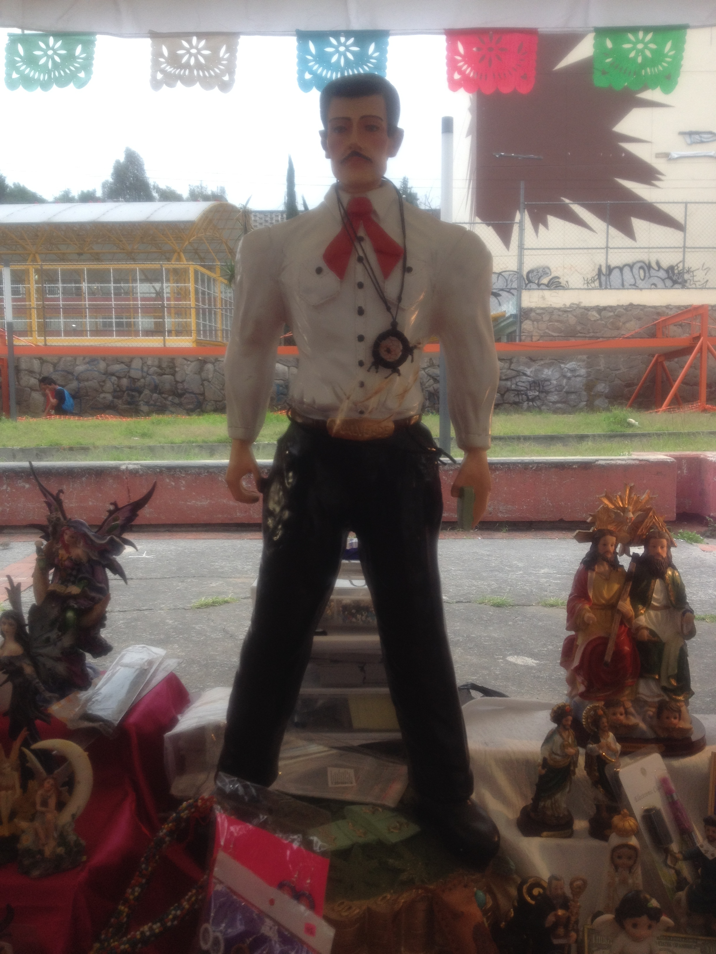 Estatua de Jesús Malverde, el "Santo de los Narcos", del estado de Oaxaca, México presentada en la feria Guelaguetza 2014